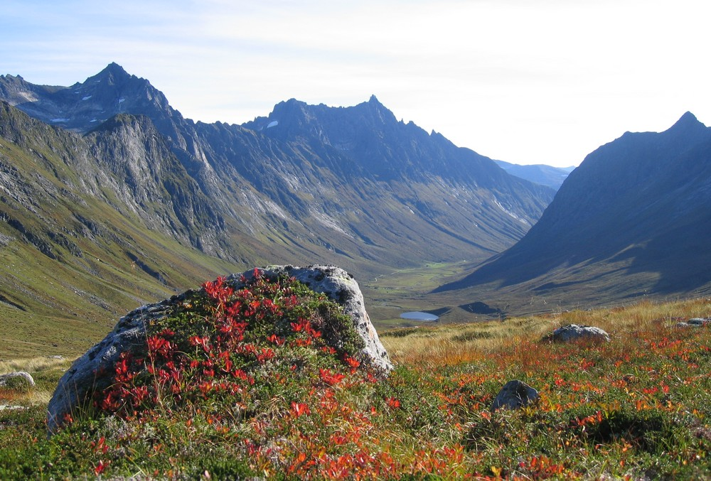 Romedalen, Ørsta, Møre og Romsdal,Norway